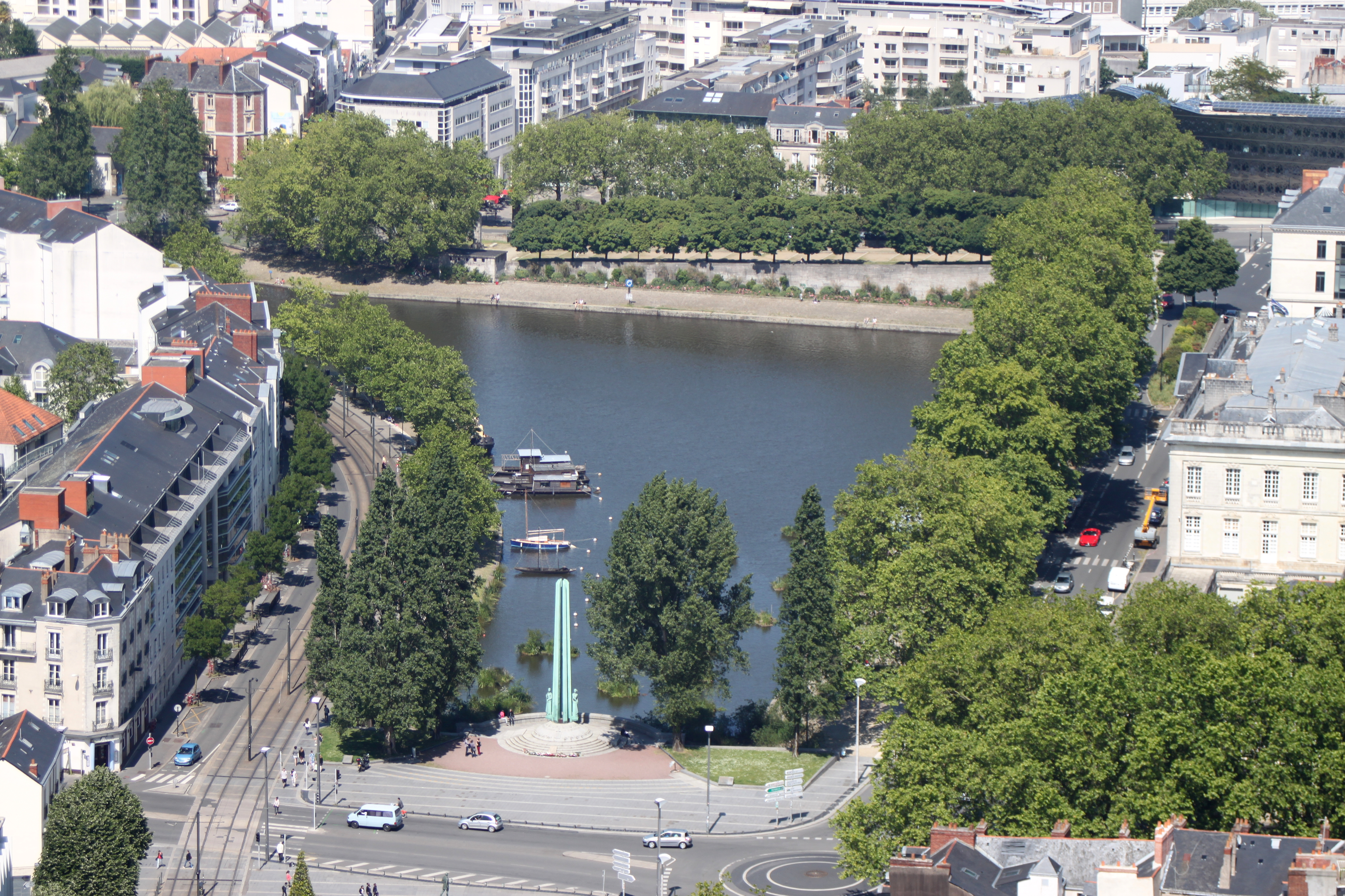 Place du Pont-Morand (en bas), monument aux 50-Otages, l'Erdre, le quai de Versailles (à gauche), la rue Sully (en haut), le quai Ceineray et la Préfecture (à droite),Fr-44-Nantes.